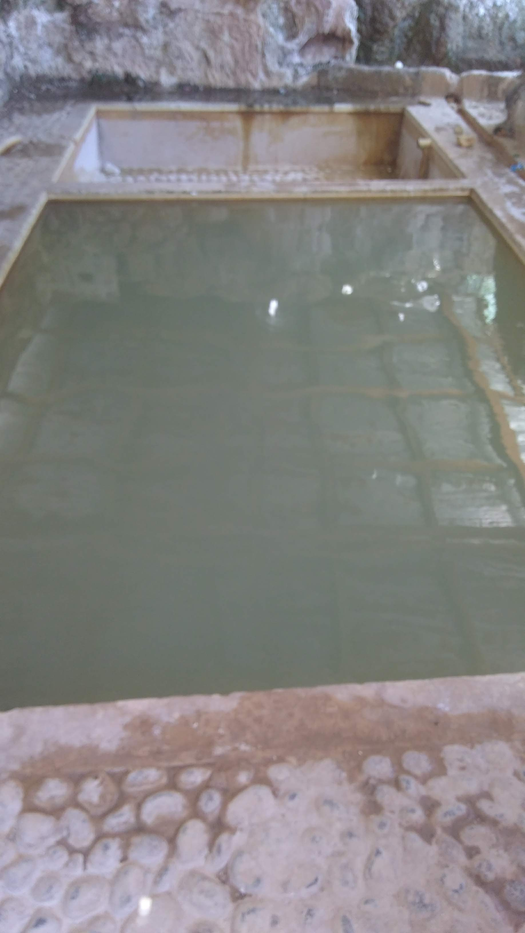 aguas tibias